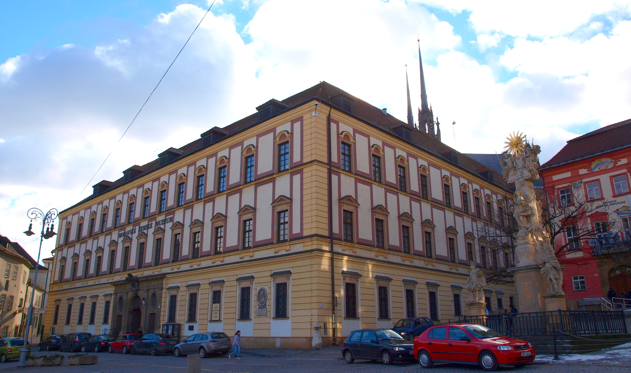 Dietrichsteinský palác, Brno